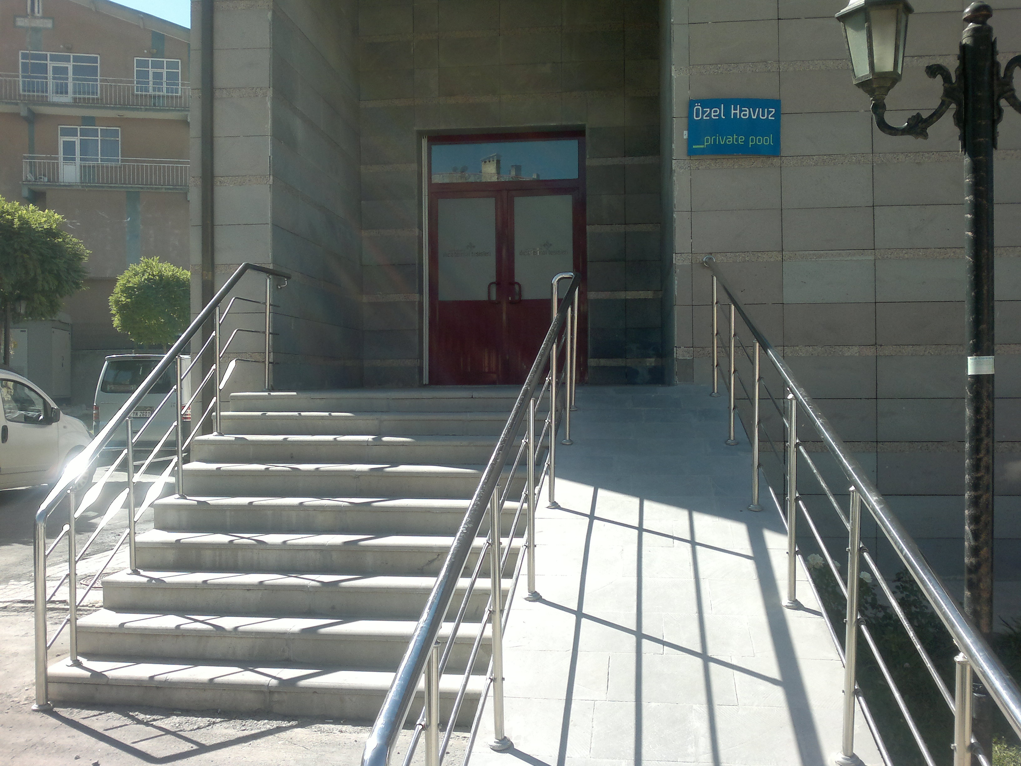 Aziziye Belediyesi Ilıca Termal Tesisleri